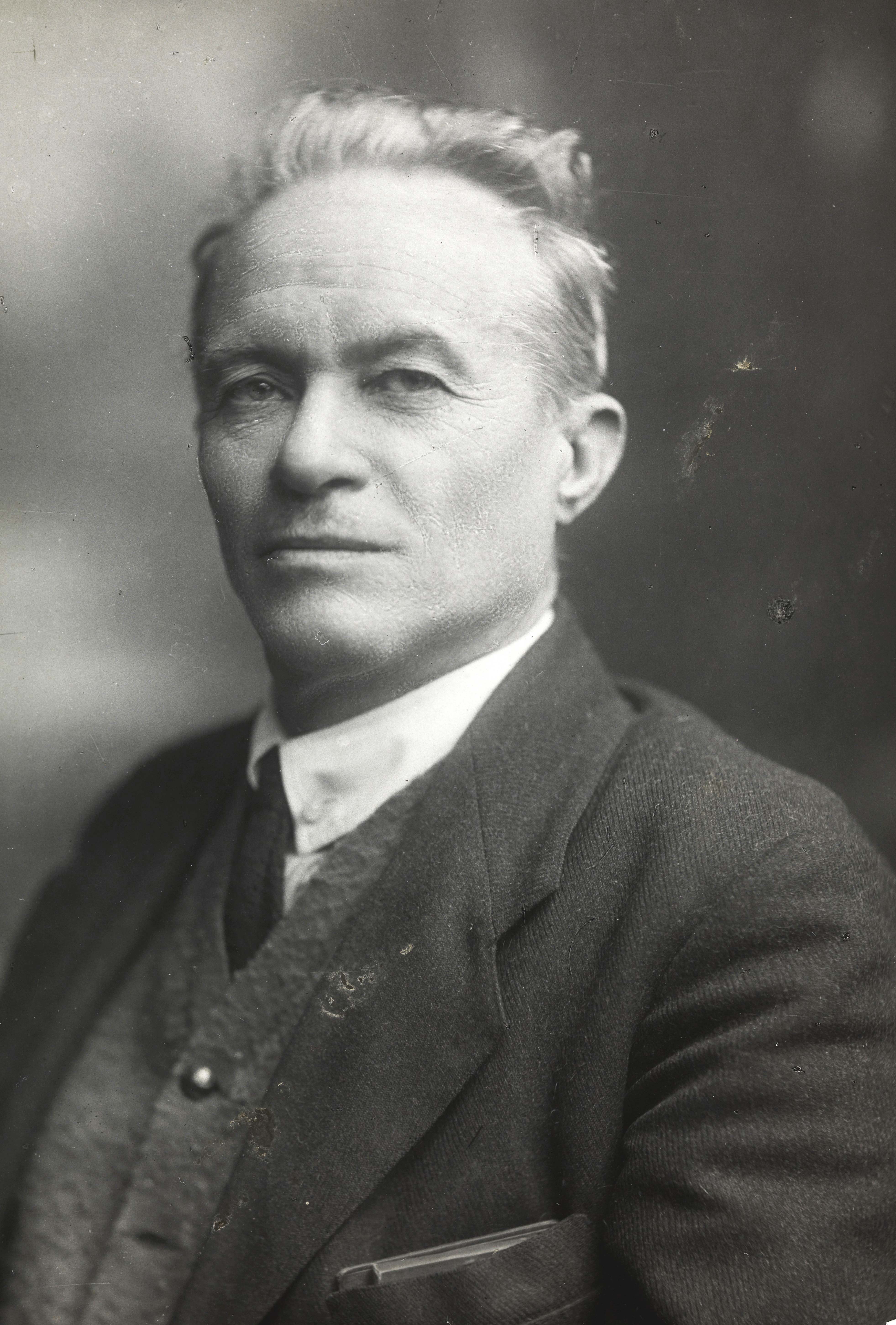 Tsinipa, Lenins stedfortreder, viseformann i rådet for Sovnarkom i Sovjetunionen. Depicted person: Tsinipa Depicted place: Russland, Moskva